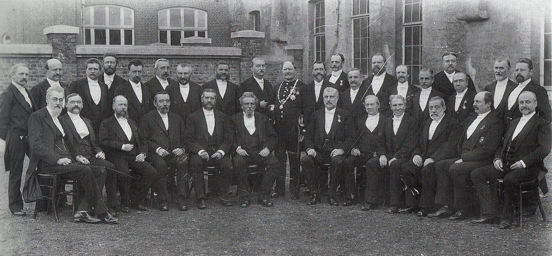 Genodigden op het 25-jarig jubileum van Willem Hubert Pijls (Pyls) als burgemeester van Maastricht. Op de achtergrond de gebouwen van het vm. Dominicanenklooster en Stedelijk Lyceum aan de Helmstraat. Geportretteerd zijn leden van de gemeenteraad en bestuursleden van het Burgerlijk Armbestuur (BA). Staand van links naar rechts: J. Nijst (gemeente-ontvanger), ir. J. Bauduin (directeur gemeentewerken), Jules Regout (ondernemer, gemeenteraadslid), A. Nierstrasz (notaris, gemeenteraadslid), Ch.C.S.A. Gadet (middenstander, gemeenteraadslid), G. Rutten (bierbrouwer, lid BA), P.C. Nijst (commandant DD Stadsschutterij, gemeenteraadslid), mr.G. Straetmans (rentenier, Tweede Kamerlid, lid BA), mr. G.D. Franquinet (ondernemer, schoolopziener, lid BA), W.H. Pijls (ondernemer, burgemeester, voorzitter BA), Edm. Houtappel (wijnhandelaar, gemeenteraadslid), mr. T.G. Ating van Geusau (advocaat-procureur, gemeenteraadslid), J.L.F. v. Oppen (ondernemer, gemeenteraadslid), N. Gilissen (bierbrouwer, gemeenteraadslid), H.H.J. v. Hasselt (rentenier, gemeenteraadslid), J.M.H. Quadvlieg (notaris, lid BA), J. Sougnez (bierbrouwer, gemeenteraadslid), H. Seidlitz (ondernemer, gemeenteraadslid), G.H.H. Motké (rijskbelastingontvanger, gemeenteraadslid) en H.F.M. Alard (wapenhandelaar, gemeenteraadslid). Fotocollectie RHCL Maastricht, collectie L.G.O.G., GAM 23784. Zittend van links naar rechts: mr. Ed de Ras (griffier rechtbank, gemeenteraadslid), mr. Alphons Pijls (zoon van burgemeester Pijls), L.J.H. Polis (rentenier, gemeenteraadslid, president Momus), L.H. van Aubel (bierbrouwer, gemeenteraadslid), J.A.H.W. Bonhomme (ondernemer, gemeenteraadslid), J.M. Marres (bierbrouwer, gemeenteraadslid), P.C.H. Bauduin (ondernemer, wethouder), A. van Osch (gemeente-ontvanger), dr. F.E. Fouquet (geneesheer, gemeenteraadslid), E.J.W.H.L. Startz (ondernemer, gemeenteraadslid), jhr. Mr. Gustave Ruys de Beerenbrouck (rechter, gemeenteraadslid) en mr. Ch. Berger (president rechtbank, lid BA).